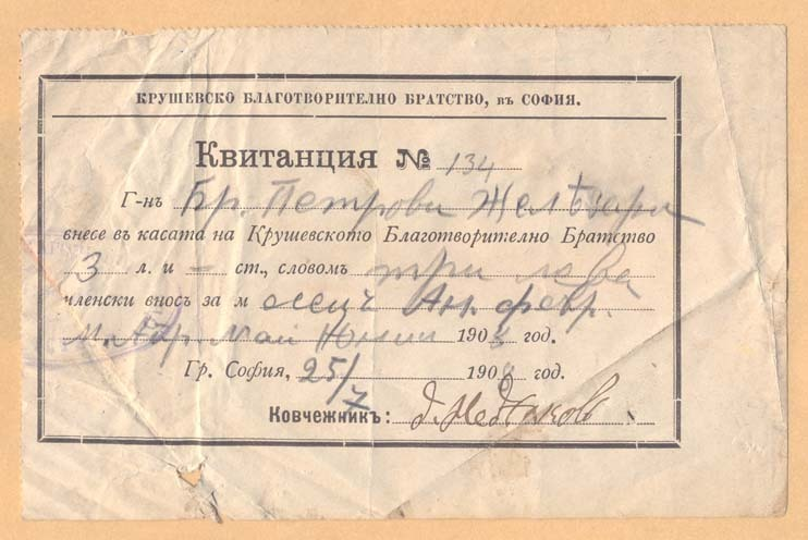 Разписка на Крушевското македонско братство